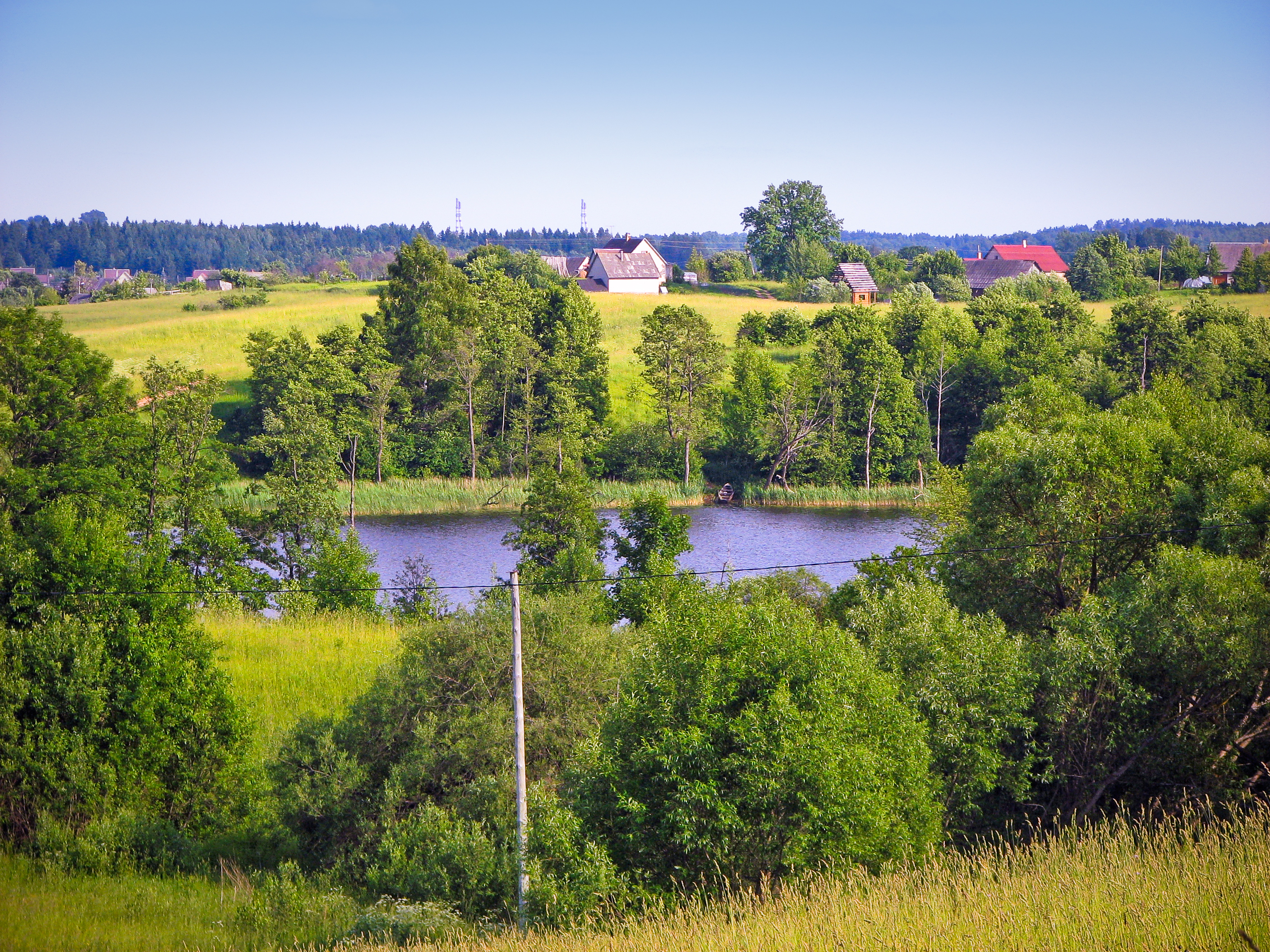 озеро Кумпотис